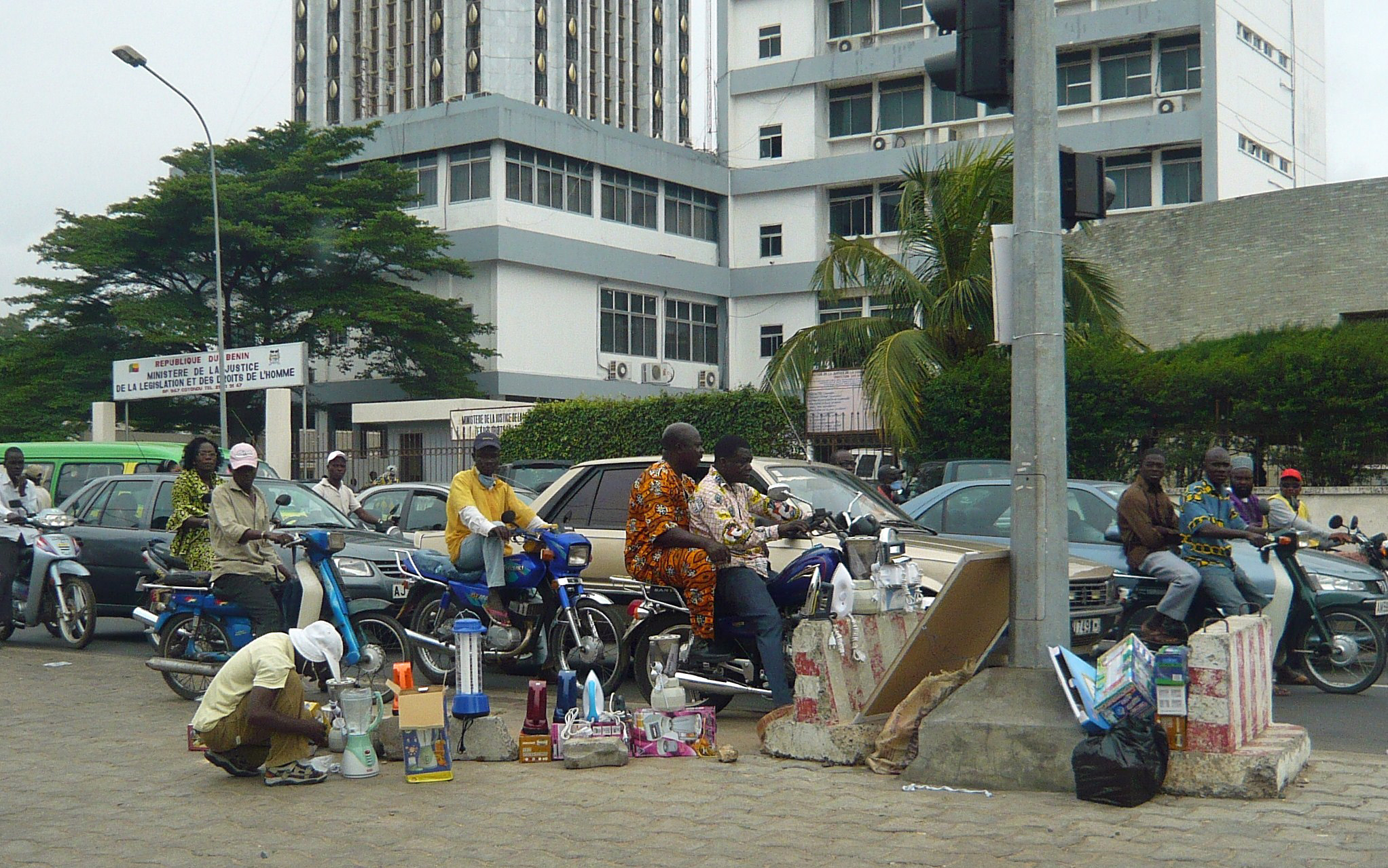 On the street. Cotonou. Benin